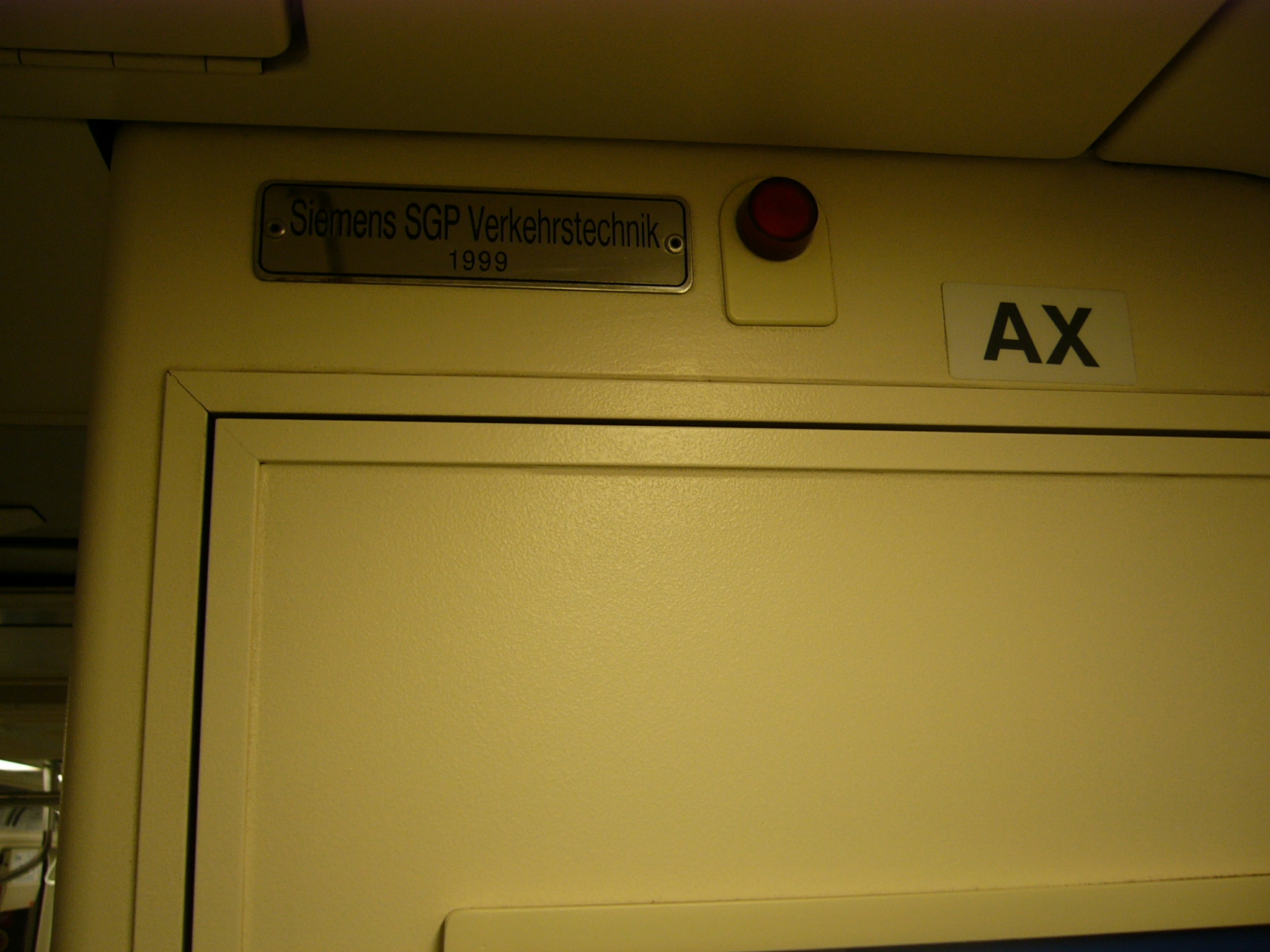 台北捷運321型電聯車內的Siemens SGP Verkehrstechnik銘板（左上）